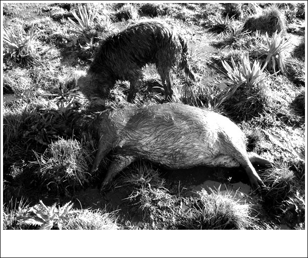 Cão da raça Barbudo, abateu a capivara no charco e trouxe até a margem. 1983: Sul do Brasil.